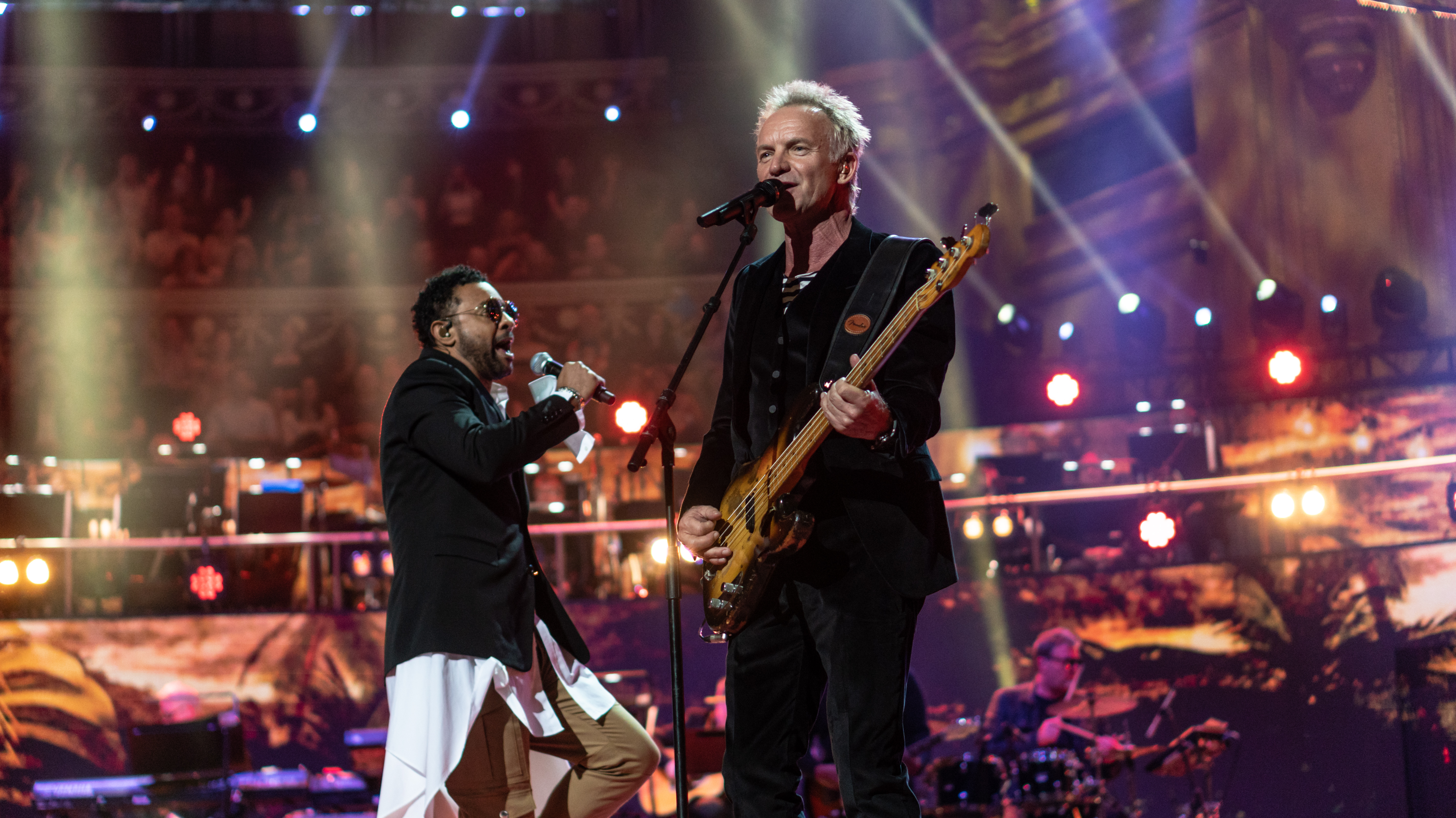 QueenbdayRAH210418-34